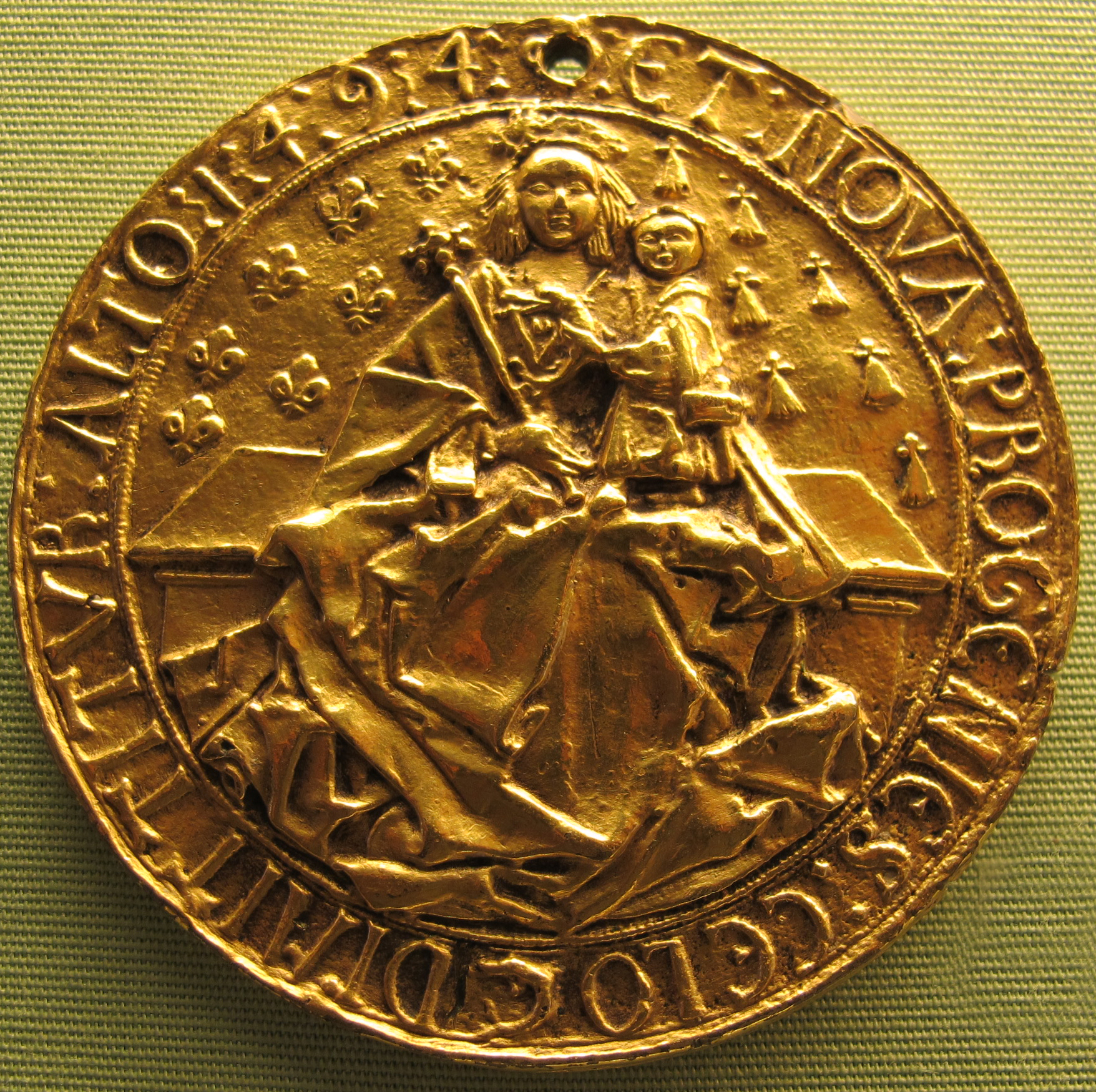 Ignoto, anna di bretagna col delfino carlo-orlando, 1494